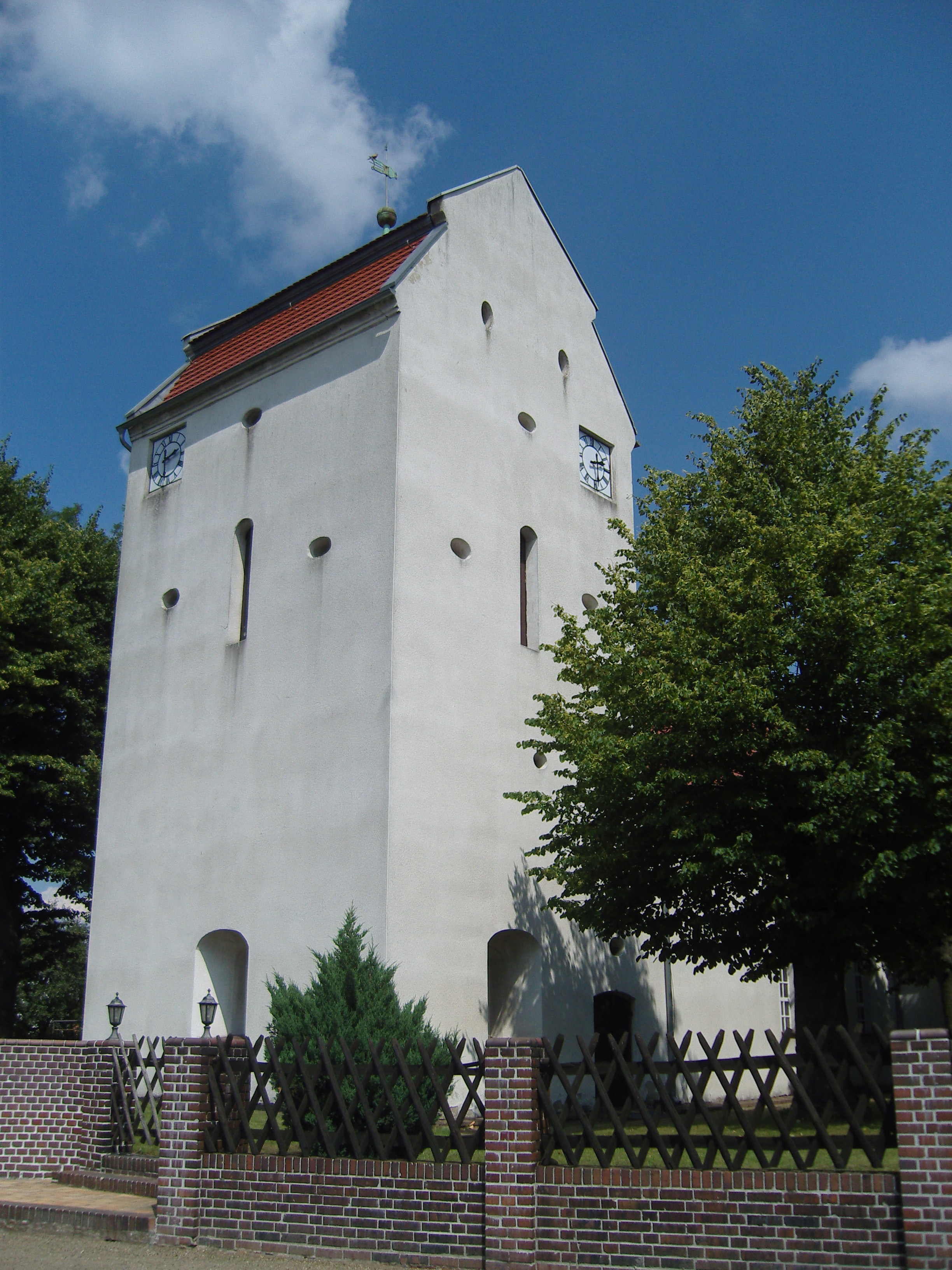 Denkmalgeschützte Dorfkirche im Großräschener Ortsteil Freienhufen